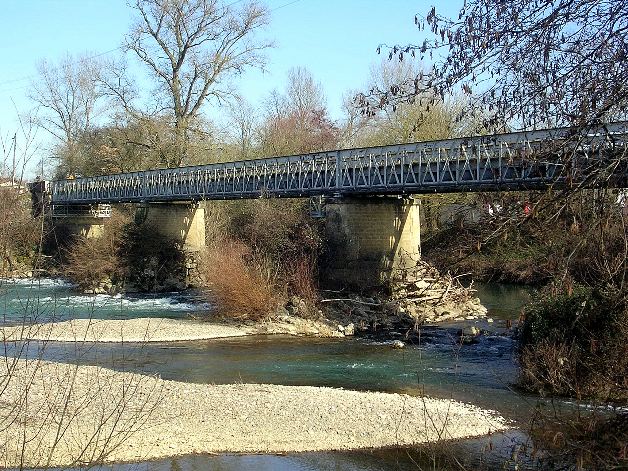 Pont métallique franchissant l'Adour sur la commune de Cazères-sur-l'Adour, œuvre de l'ingénieur Gustave Eiffel.